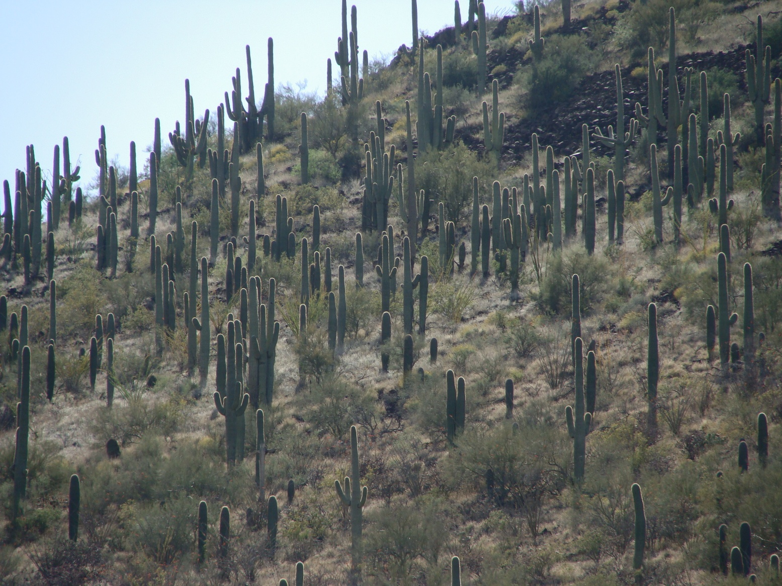 Sentinel Peak park, Tucson, Arizona